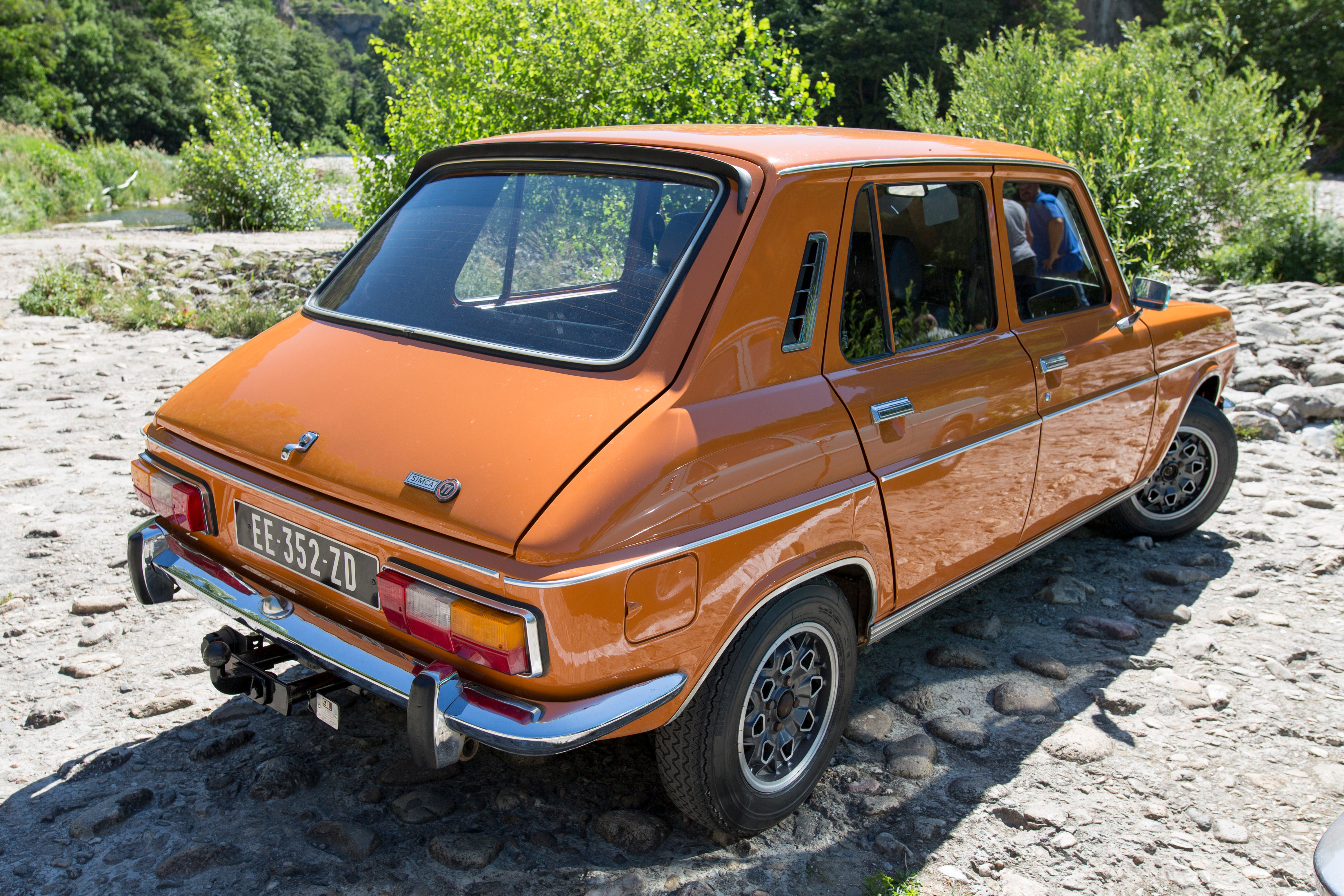 Simca 1100 à Sainte-Énimie